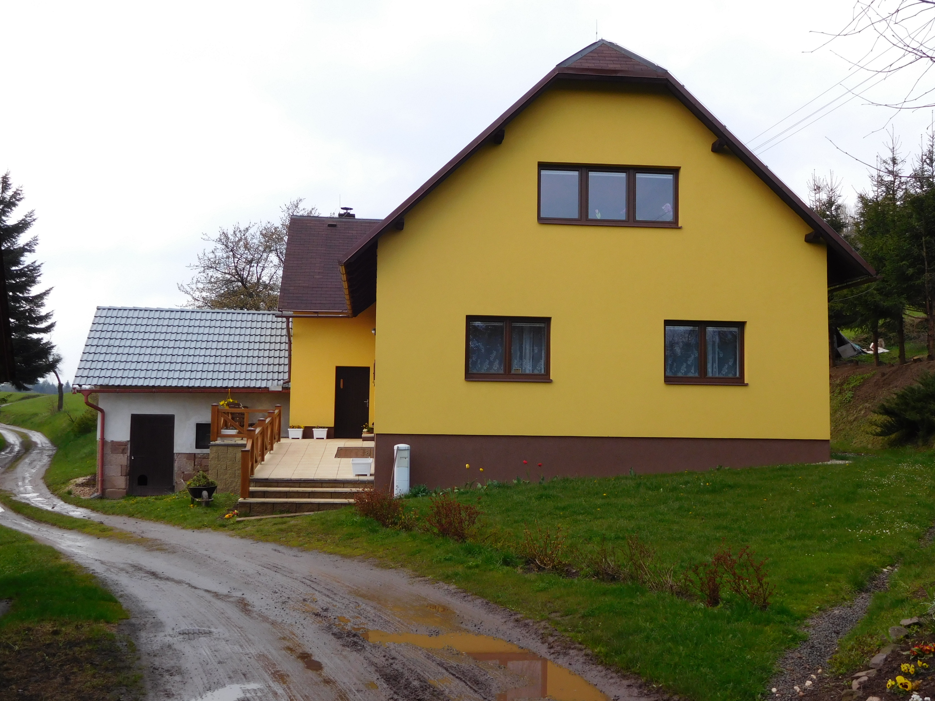 Vranovsko - dům č.p. 3